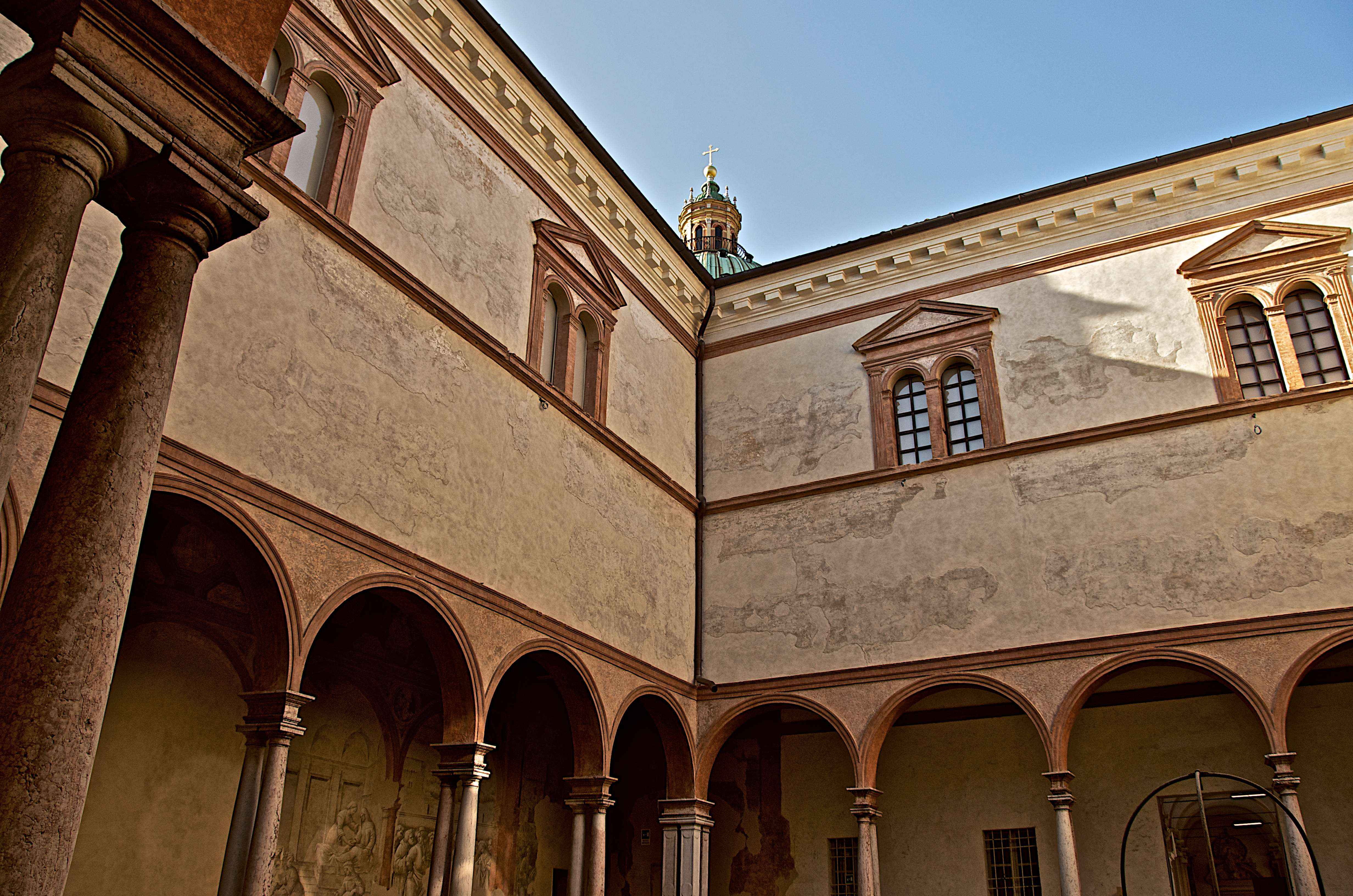 Chiostri di San Pietro This is a photo of a monument which is part of cultural heritage of Italy.